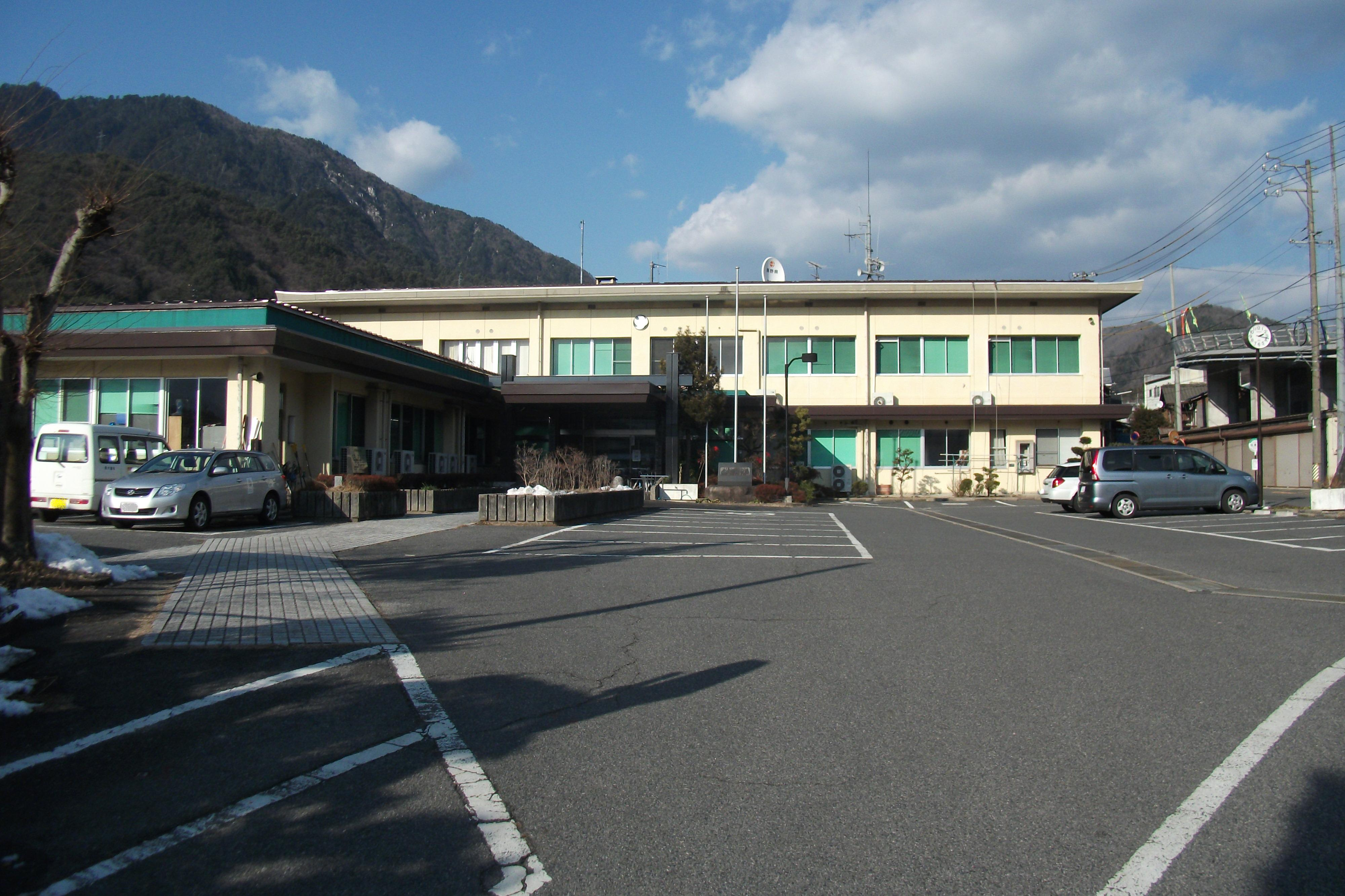 長野県木曽郡南木曽町役場